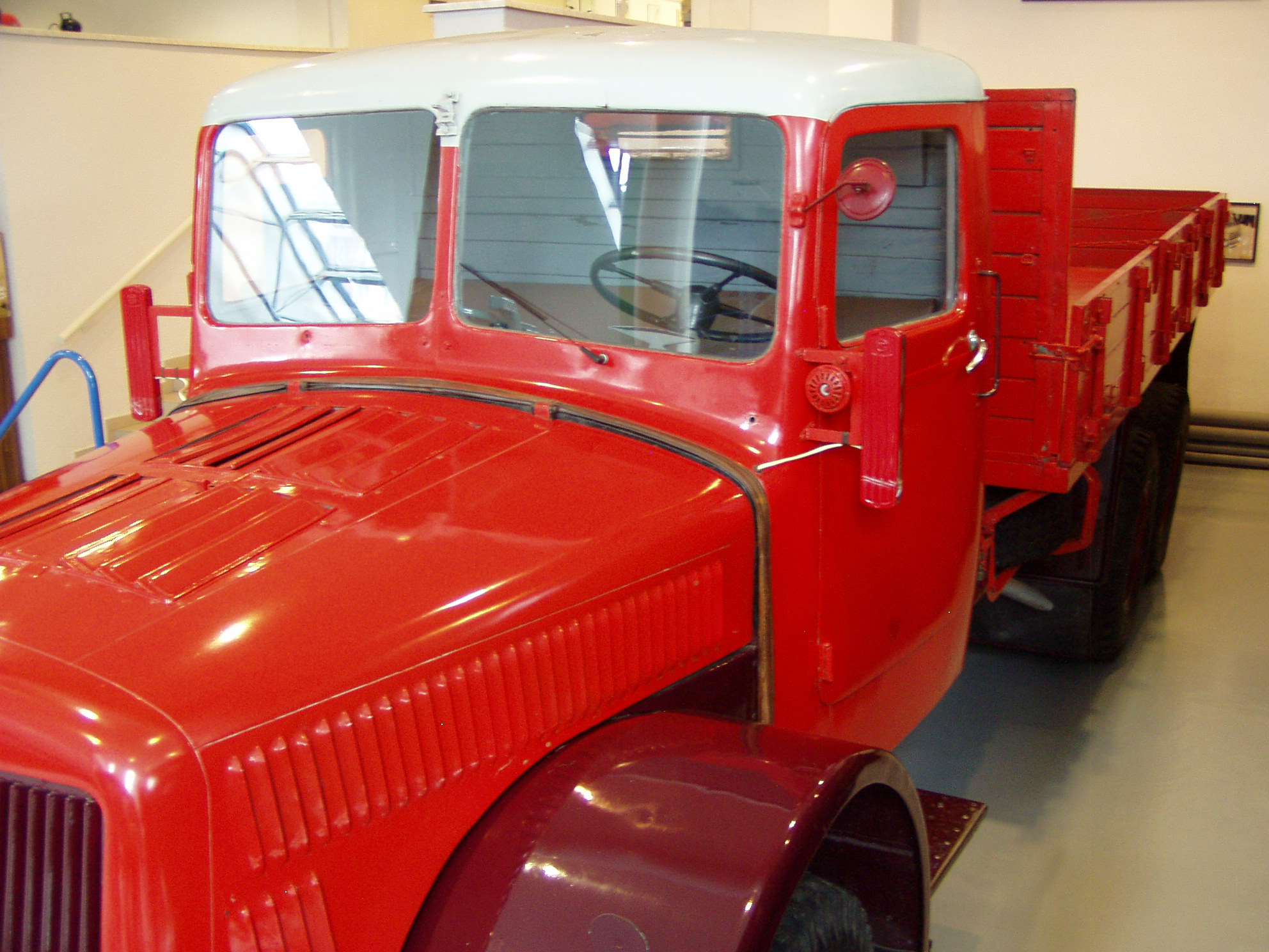 Tatra 111